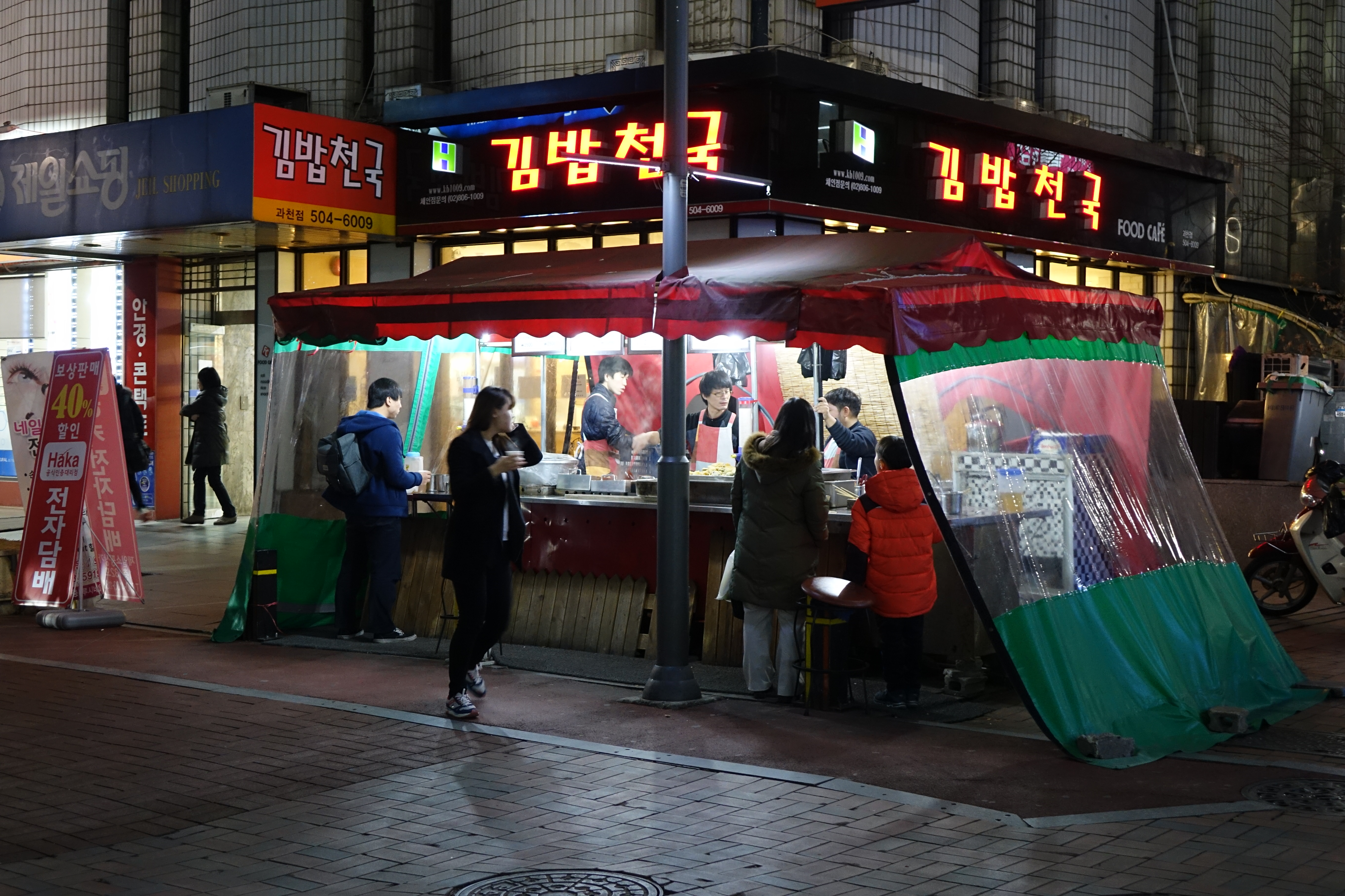 2015년 12월 경기도 과천시